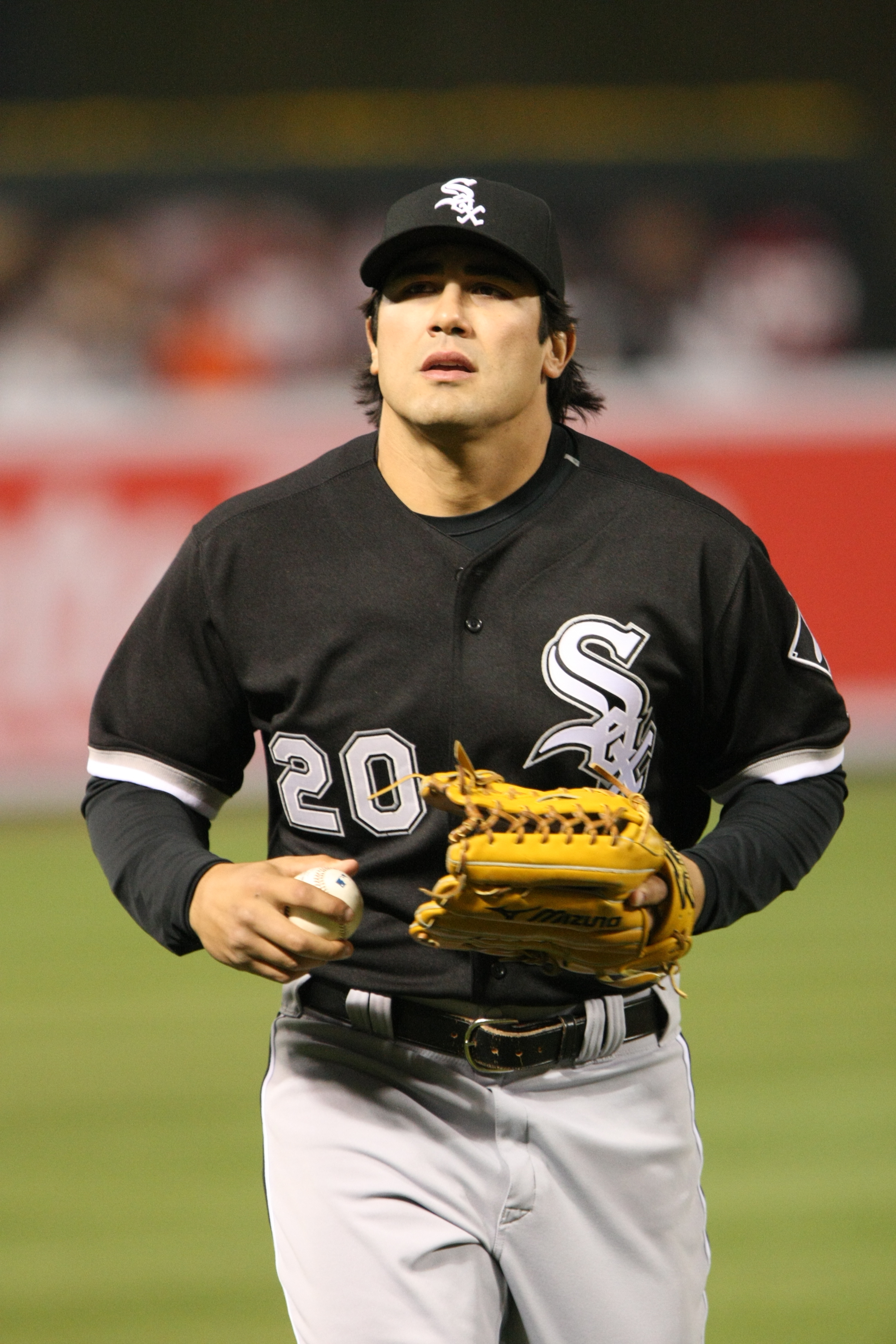 Carlos Quentin